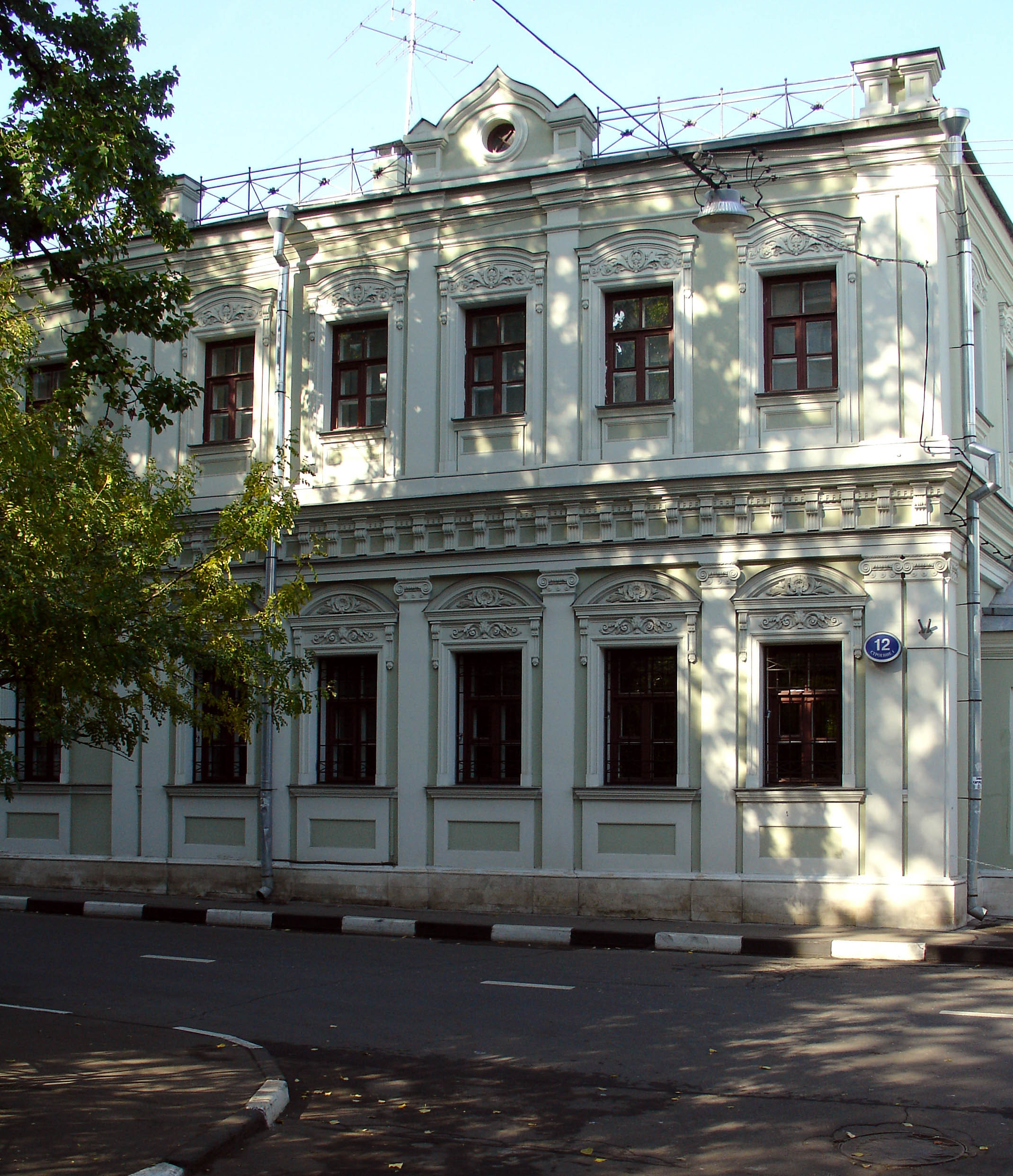 Vishnyakovsky Lane, Moscow